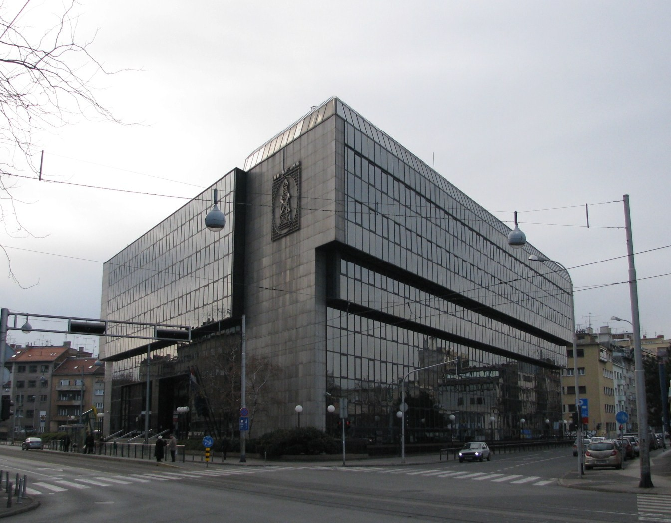 Zgrada INA Naftaplina u Zagrebu, Šubićeva ulica